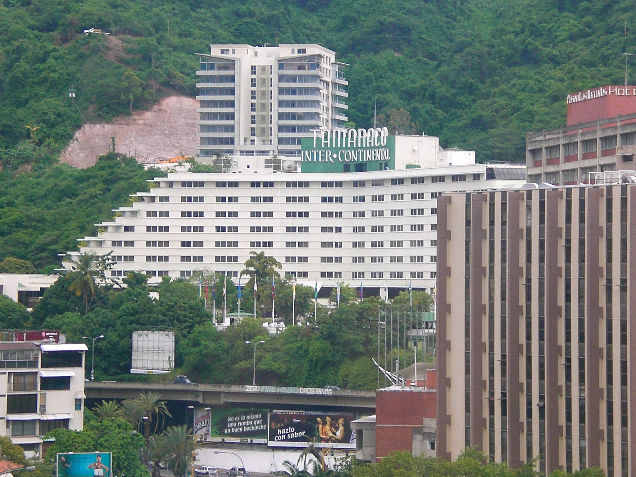 Tamanaco Hotel, Baruta Municipality, Caracas.